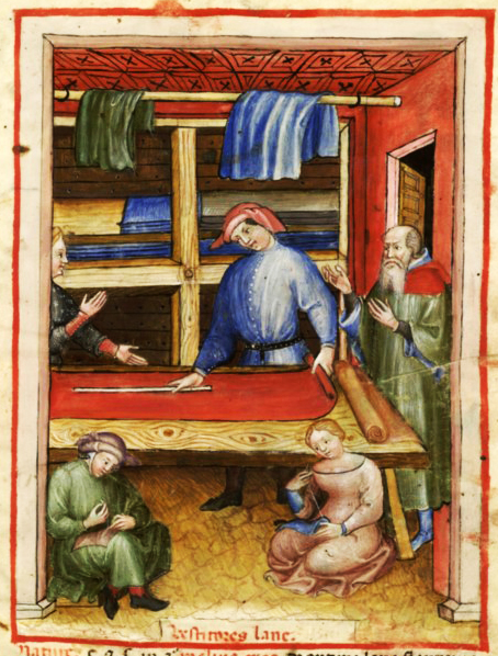 Сукощики за работой. Миниатюра из "Tacuinum Sanitatis", средневекового трактата о здоровье. Ок. 1390-1400 гг.